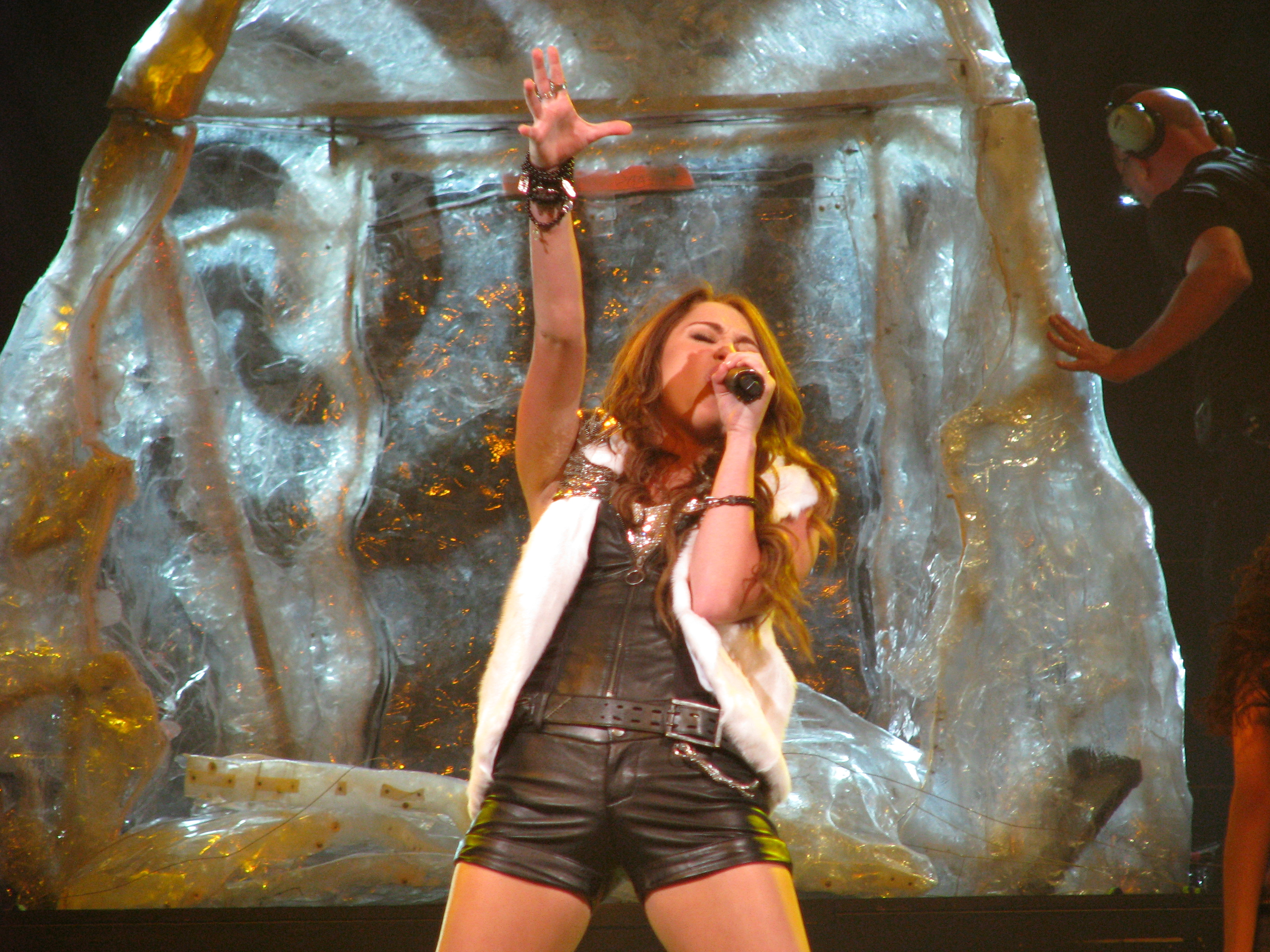 Miley Cyrus singing.